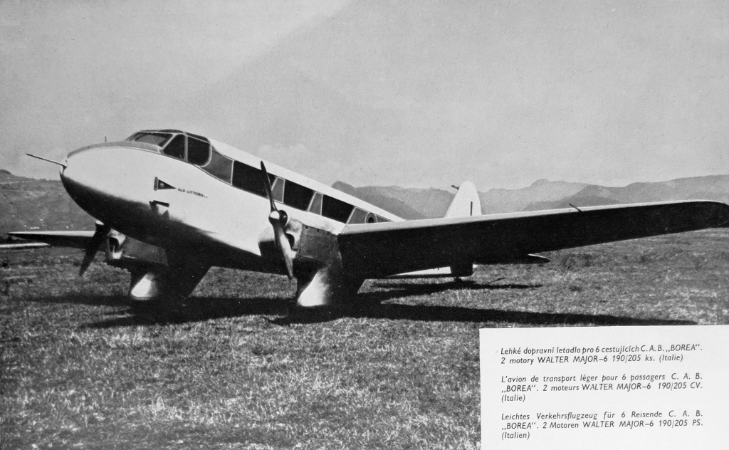 letecký motor Walter Major 6 a letoun Caproni Ca.308 Borea